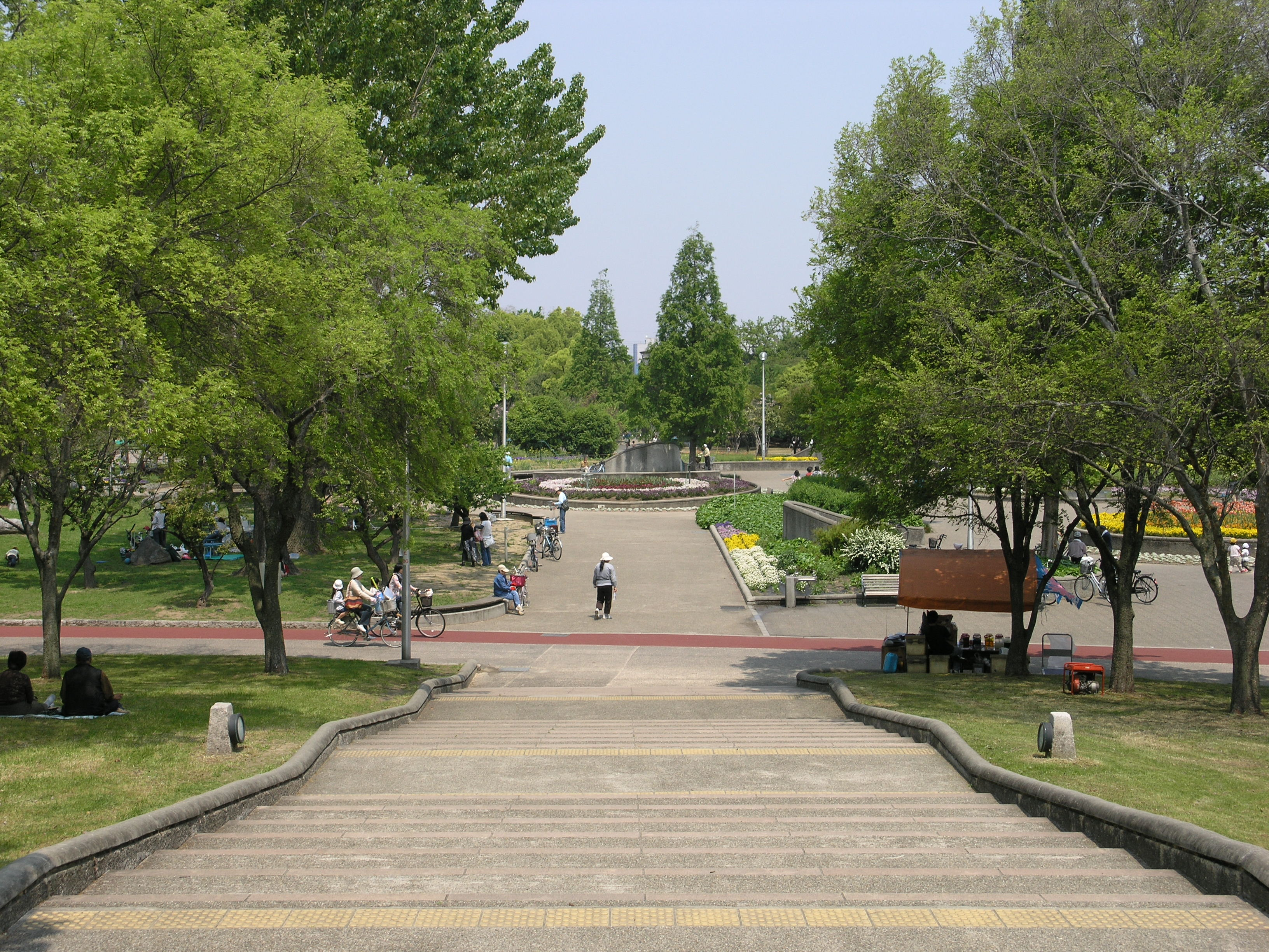 Kyuhoji Ryokuchi Park in Yao and Higashiosaka, Osaka, Japan